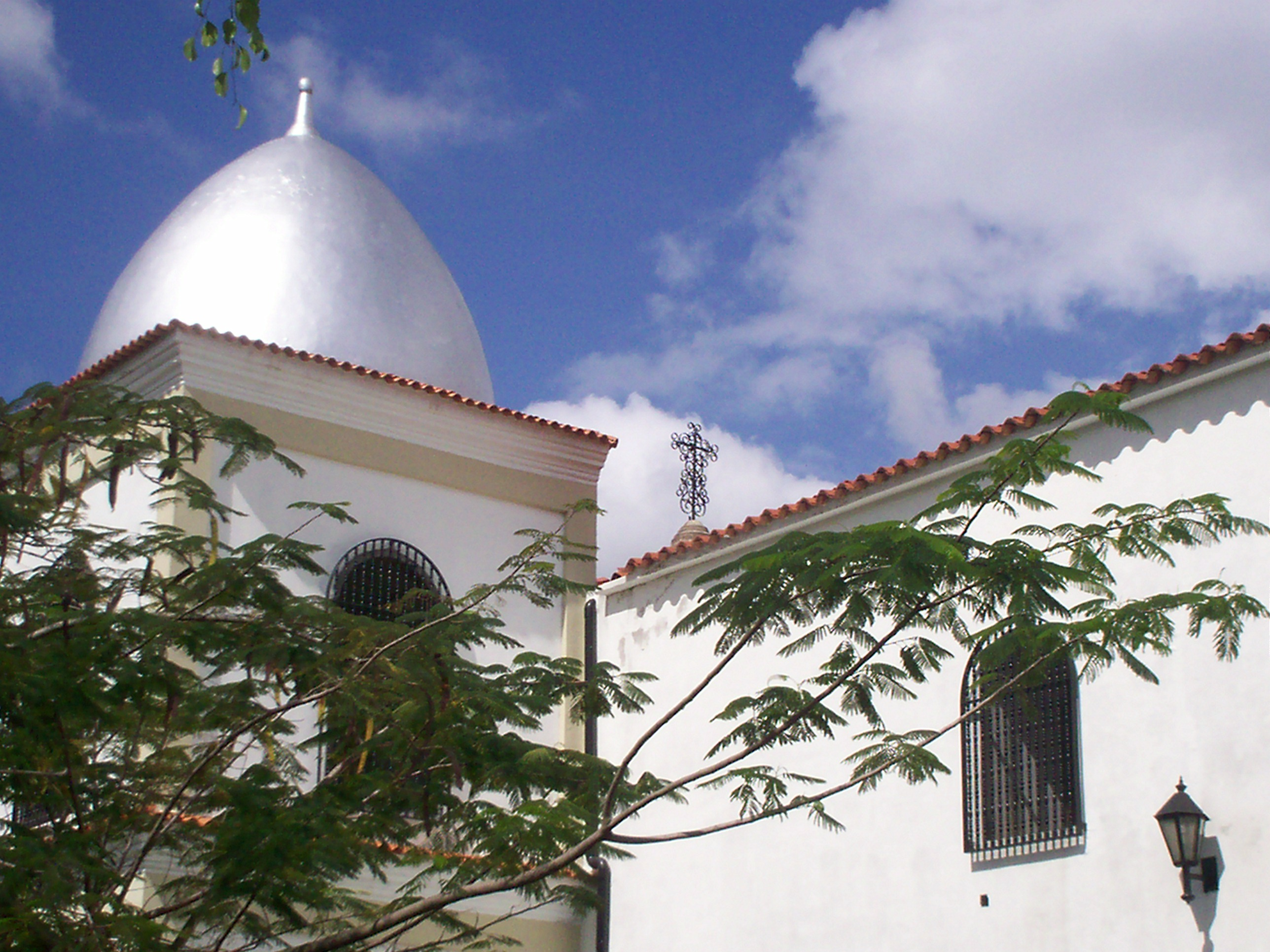 Cúpula del Campanario del Templo Parroquial Nuestra Señora del Carmen, ubicado en la Parroquia San Juan Evangelista de Paracotos, Diócesis de Los Teques, Venezuela.